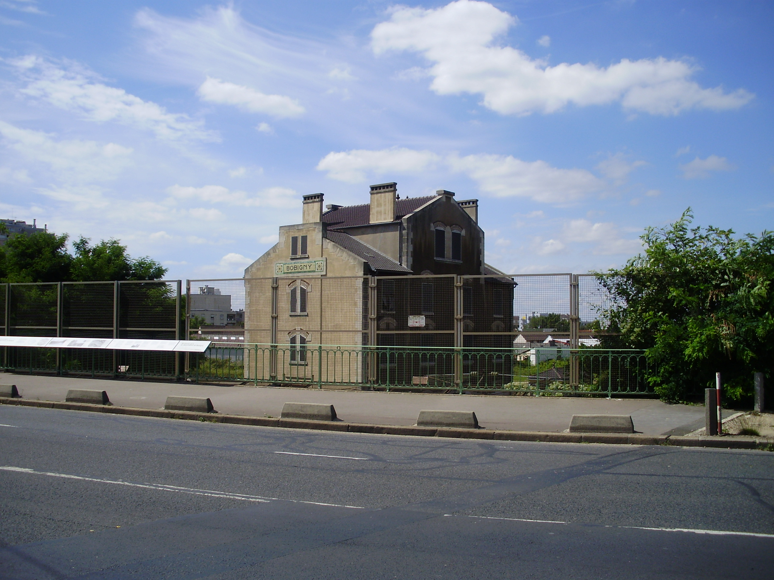 Gare de Bobigny, Seine-Saint-Denis, France : ex-bâtiment voyageurs vu depuis le trottoir sud du pont routier de l'avenue Henri-Barbusse (D 115). Le garde-corps du pont comporte, sur la gauche, un long panneau relatant l'histoire de cette ancienne gare et son utilisation tragique lors de la Deuxième Guerre mondiale.